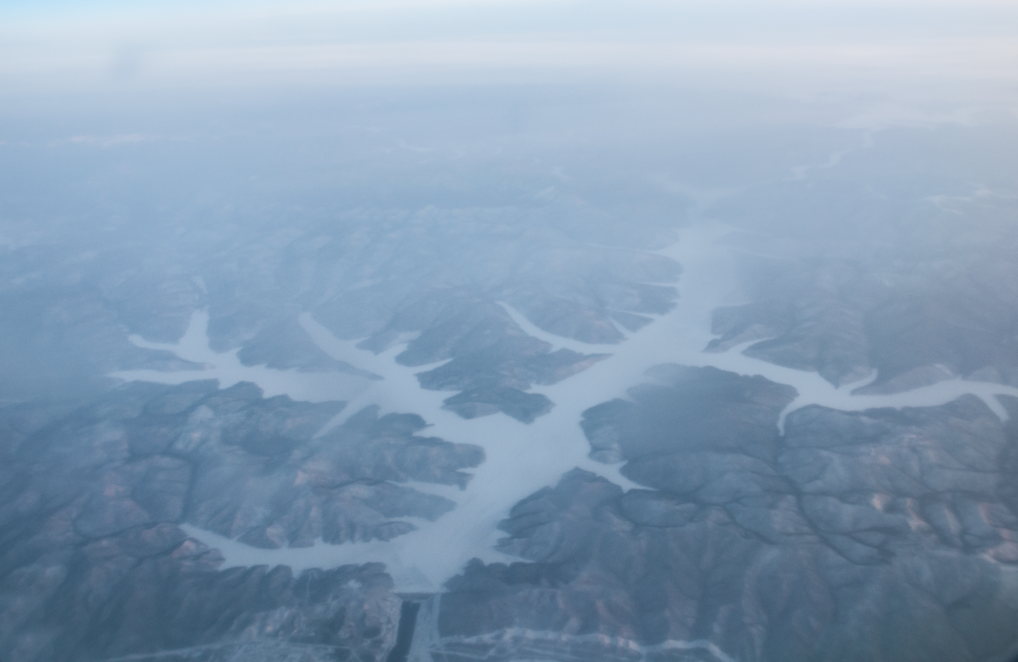 Зейское море: Выше города Зеи, Зейский район, Амурская область This image is related to the protected area of Russia number 2810075